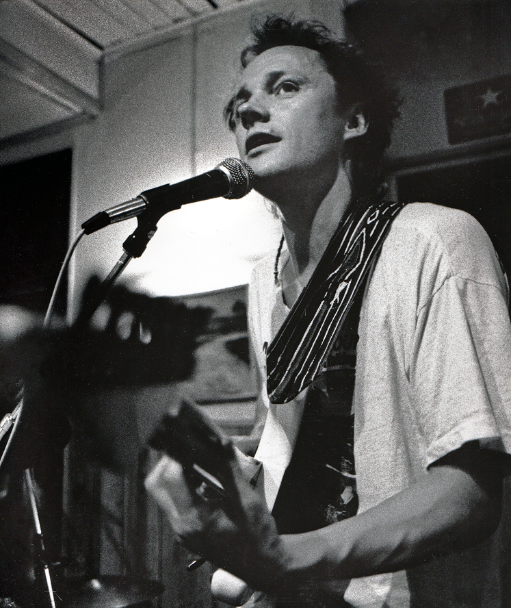 Jens Ulvsand spelar på Kantarellen i Malmö 1989.